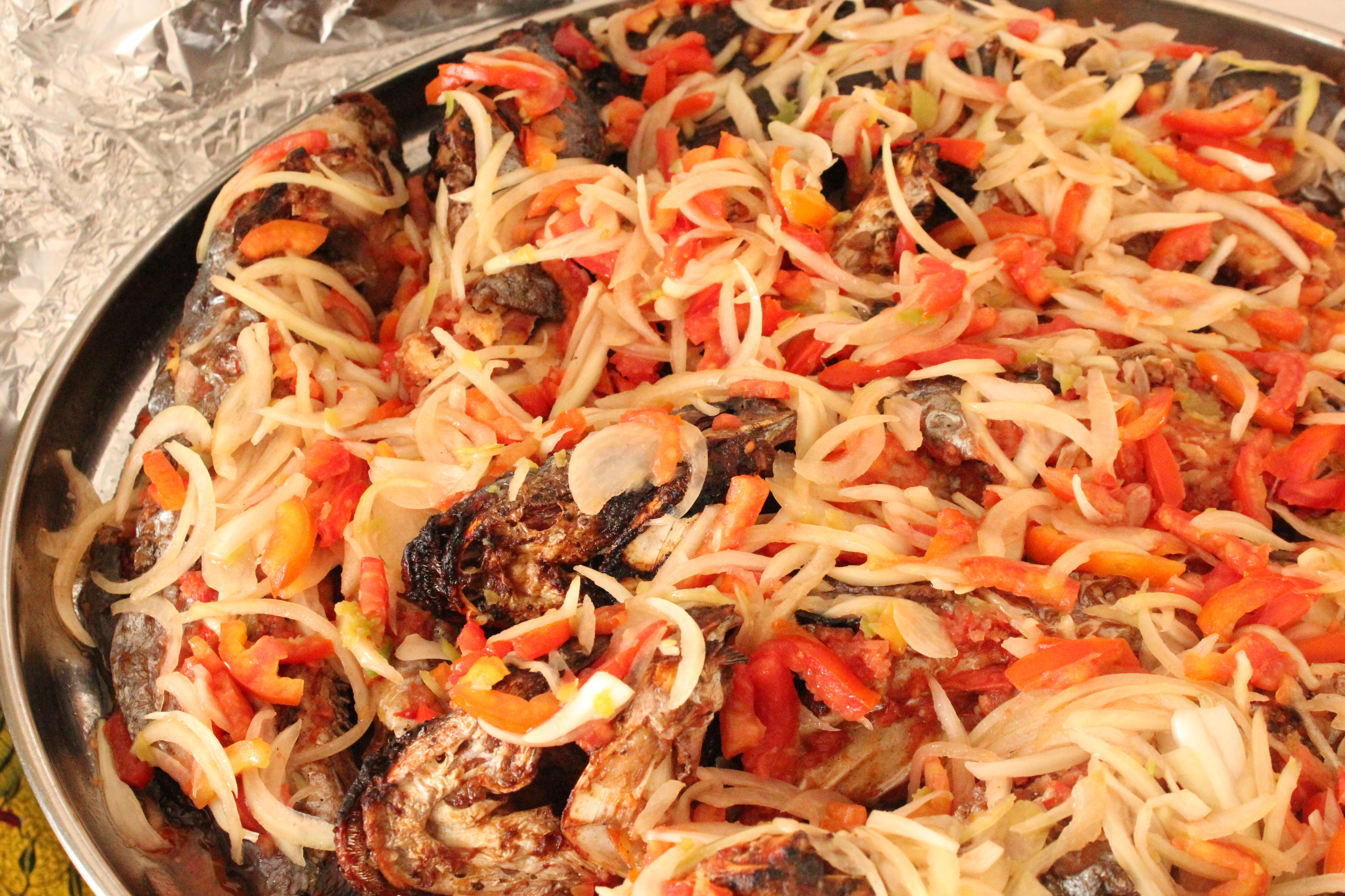 Un plat de machoiron braisé en Côte d'Ivoire This is an image of food from Ivory Coast